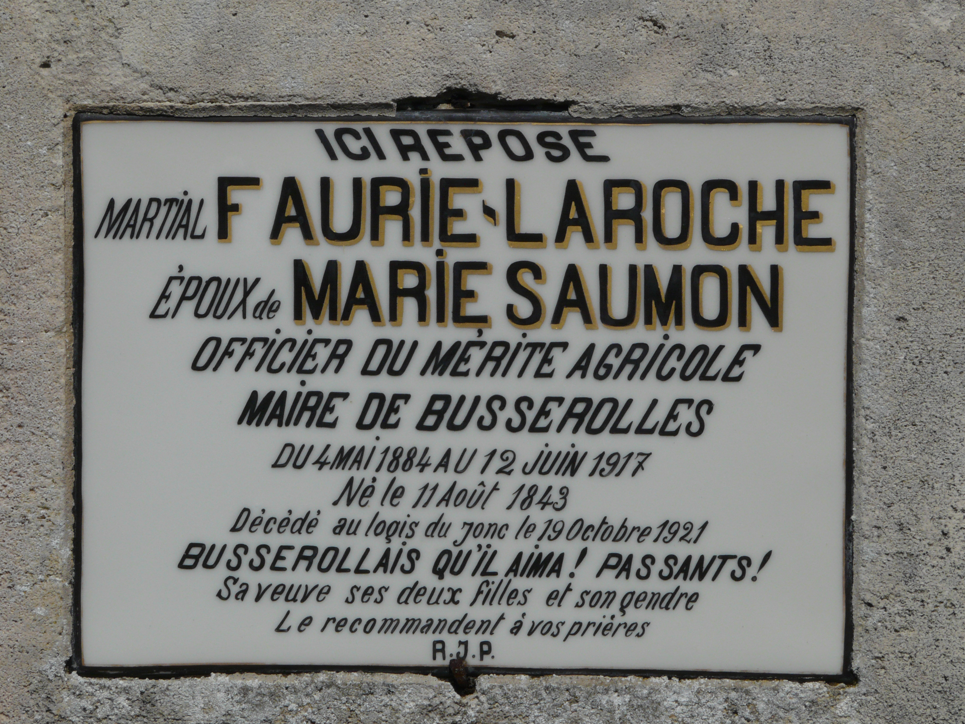 Plaque mortuaire de Martial Faurie-Laroche, ancien maire ; cimetière de Busserolles, Dordogne, France.